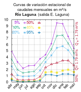 Curva de variación estacional del río Laguna en salida Embalse Laguna. # cita publicación # | apellido = Dirección General de Aguas # | nombre = # | enlace-autor = Ministerio de Obras Públicas (Chile) # | título = Diagnóstico y clasificación de los cursos y cuerpos de agua según objetivos de calidad. Cuenca del río Elqui. # | ubicación = Santiago de Chile # | editorial = Ministerio de Obras Públicas (Chile) # | año = 2004 # | edición = # | url = # | urlarchivo = # | fechaarchivo = 20070927201320 # | ref = harv # Tabla 4.1 (m3/s) pág. 42 mes 5% 10% 20% 50% 85% 95% abr 4.952 3.644 2.513 1.236 0.515 0.308 may 3.233 1.971 1.091 0.371 0.122 0.078 jun 2.232 1.471 0.887 0.338 0.103 0.051 jul 2.620 1.623 0.923 0.346 0.145 0.109 ago 2.679 1.706 0.993 0.366 0.125 0.077 sep 3.713 2.701 1.838 0.880 0.355 0.208 oct 4.365 3.807 3.225 2.346 1.565 1.211 nov 6.153 5.231 4.280 2.870 1.677 1.176 dic 9.504 7.412 5.485 3.085 1.519 1.001 ene 9.349 7.506 5.753 3.461 1.850 1.281 feb 7.307 6.243 5.133 3.458 1.969 1.293 mar 5.357 4.614 3.841 2.672 1.634 1.163 This plot was created with Gnuplot.